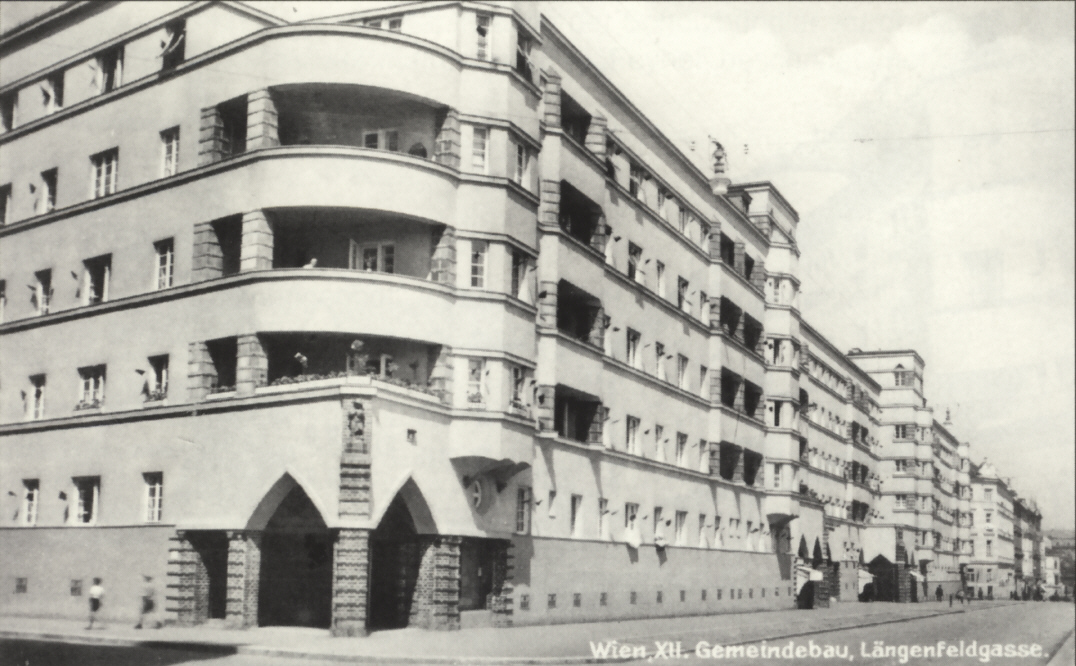 Ansichtskarte des Lorenshofes in Wien-Meidling, 1930